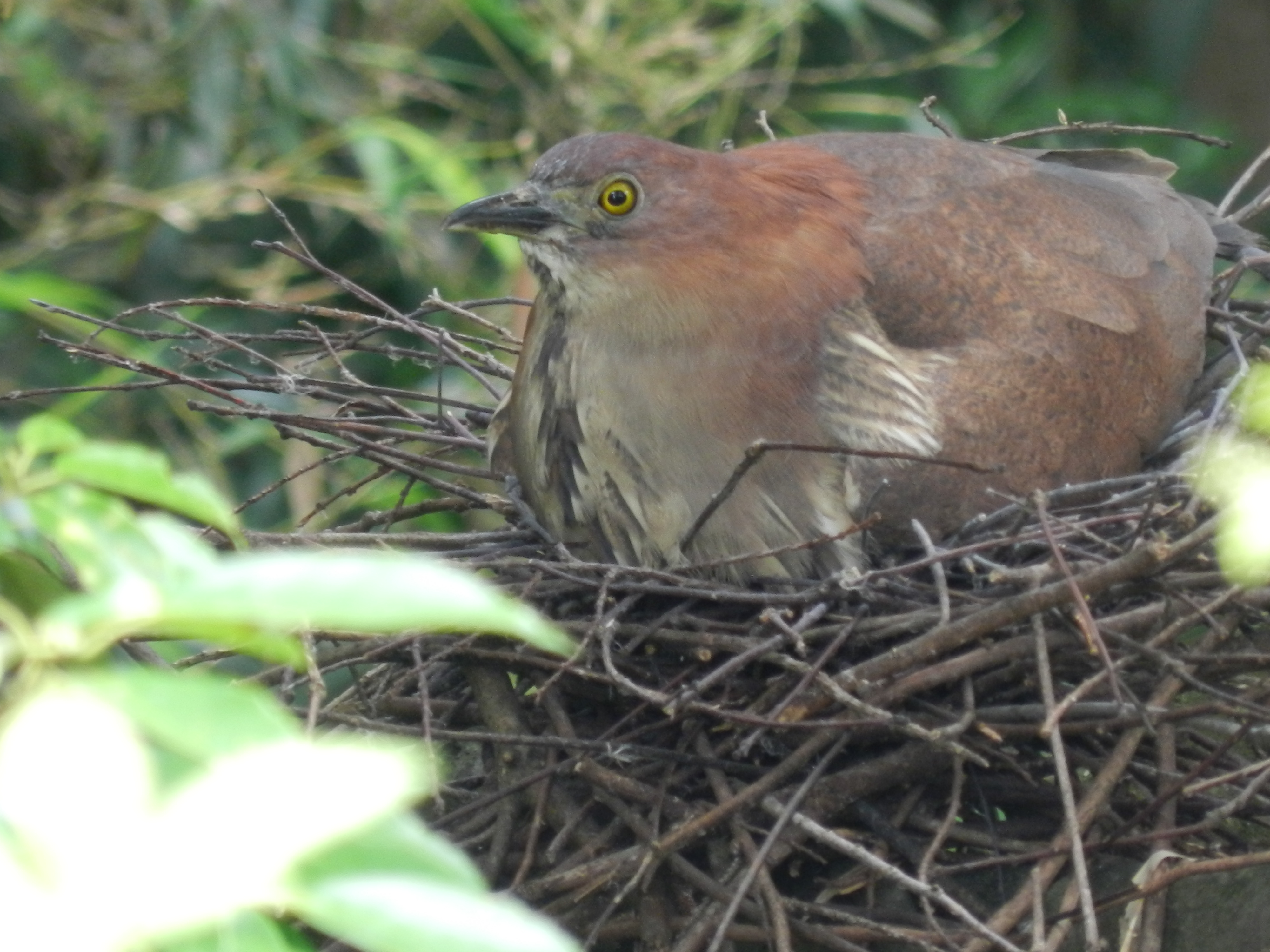 ミゾゴイ営巣中の様子